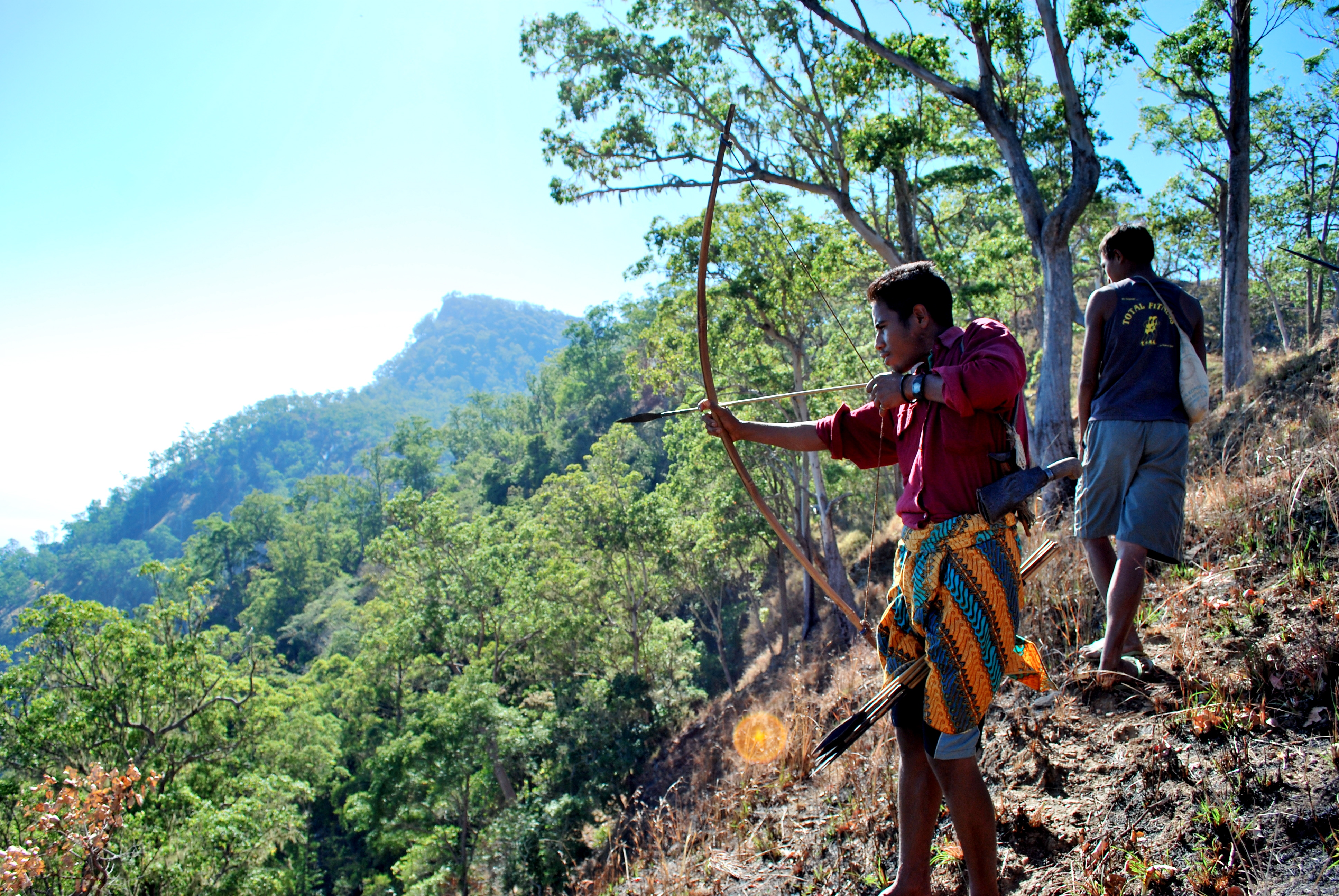 Bogenschützen in Ili-Mano